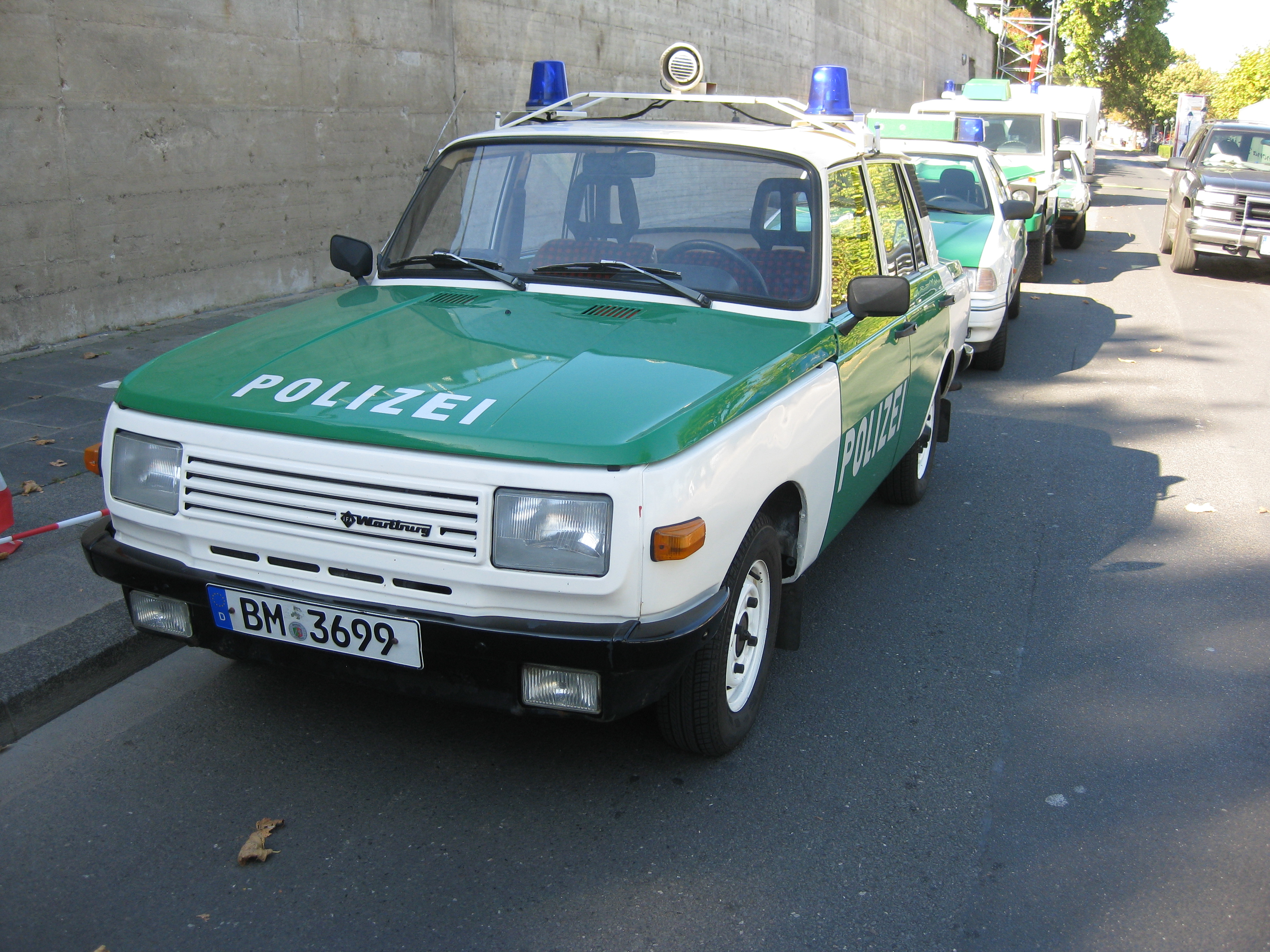 Außer Dienst gestellte alte Fahrzeuge der nordrhein-westfälischen Polizei; fotografiert am Vorabend einer Fahrzeugschau anlässlich des Deutschlandtages 2011